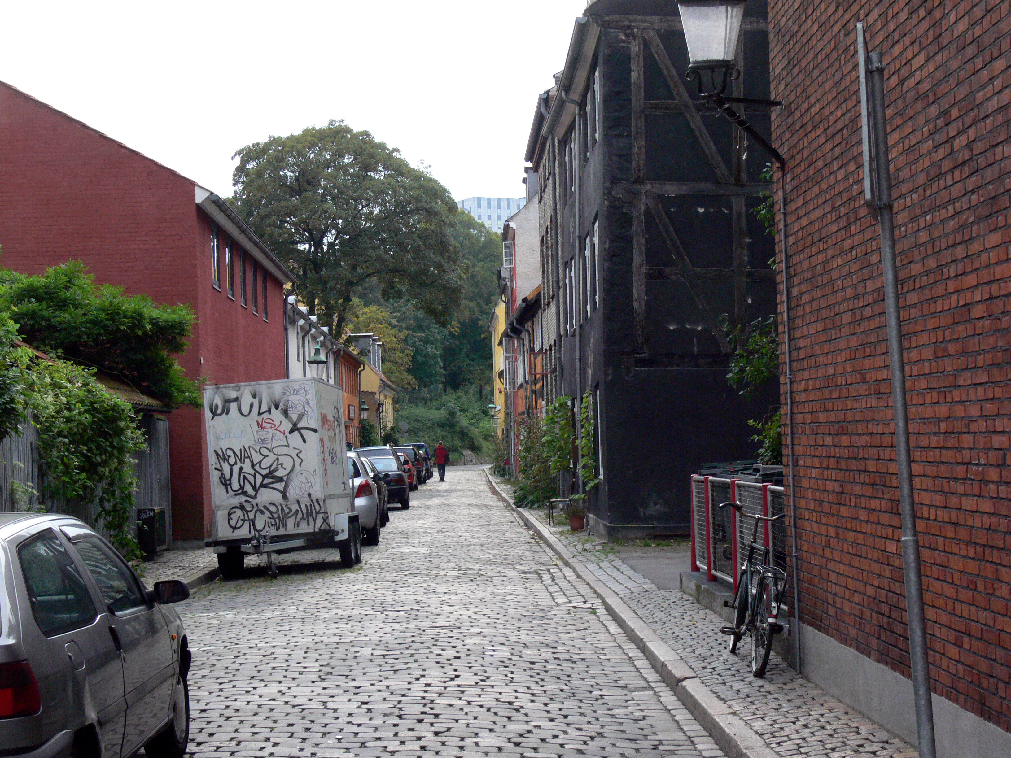 Amagergade in Kopenhagen. Häuser aus dem 18. Jh.